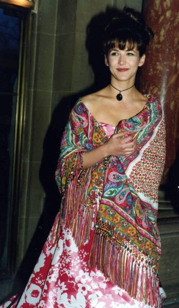 Sophie Marceau à la cérémonie des Molières.